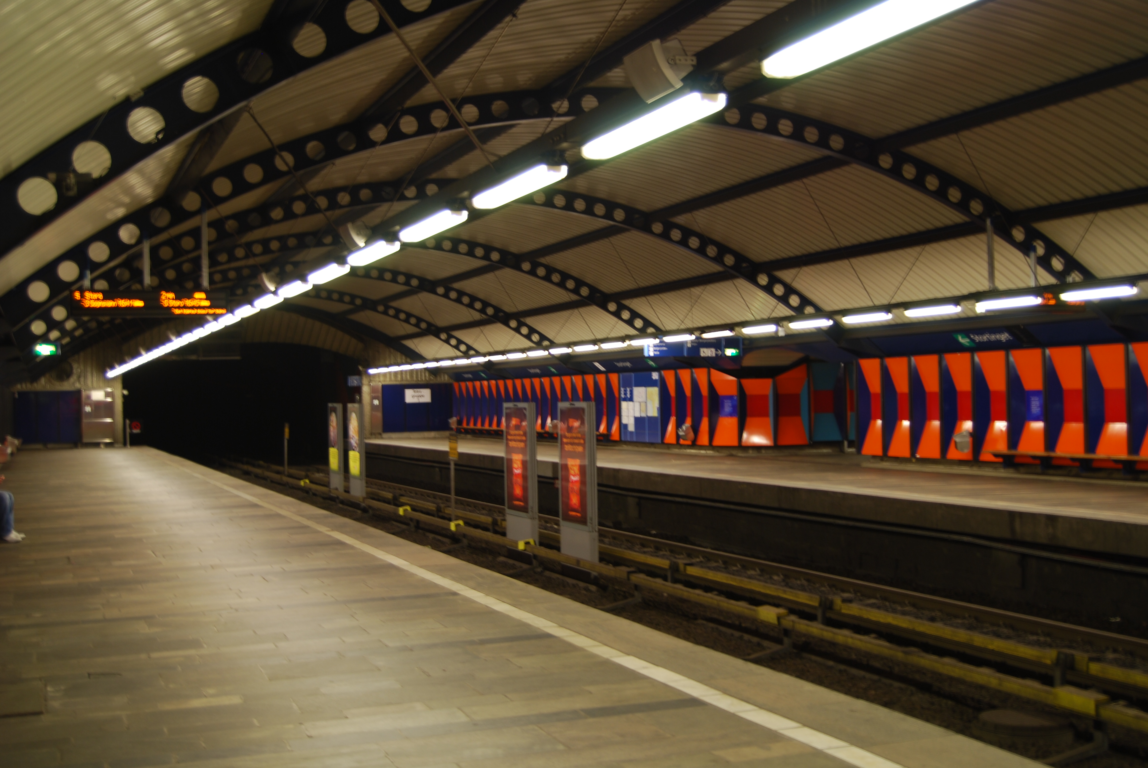 Stortinget stasjon (Oslo) 2009.